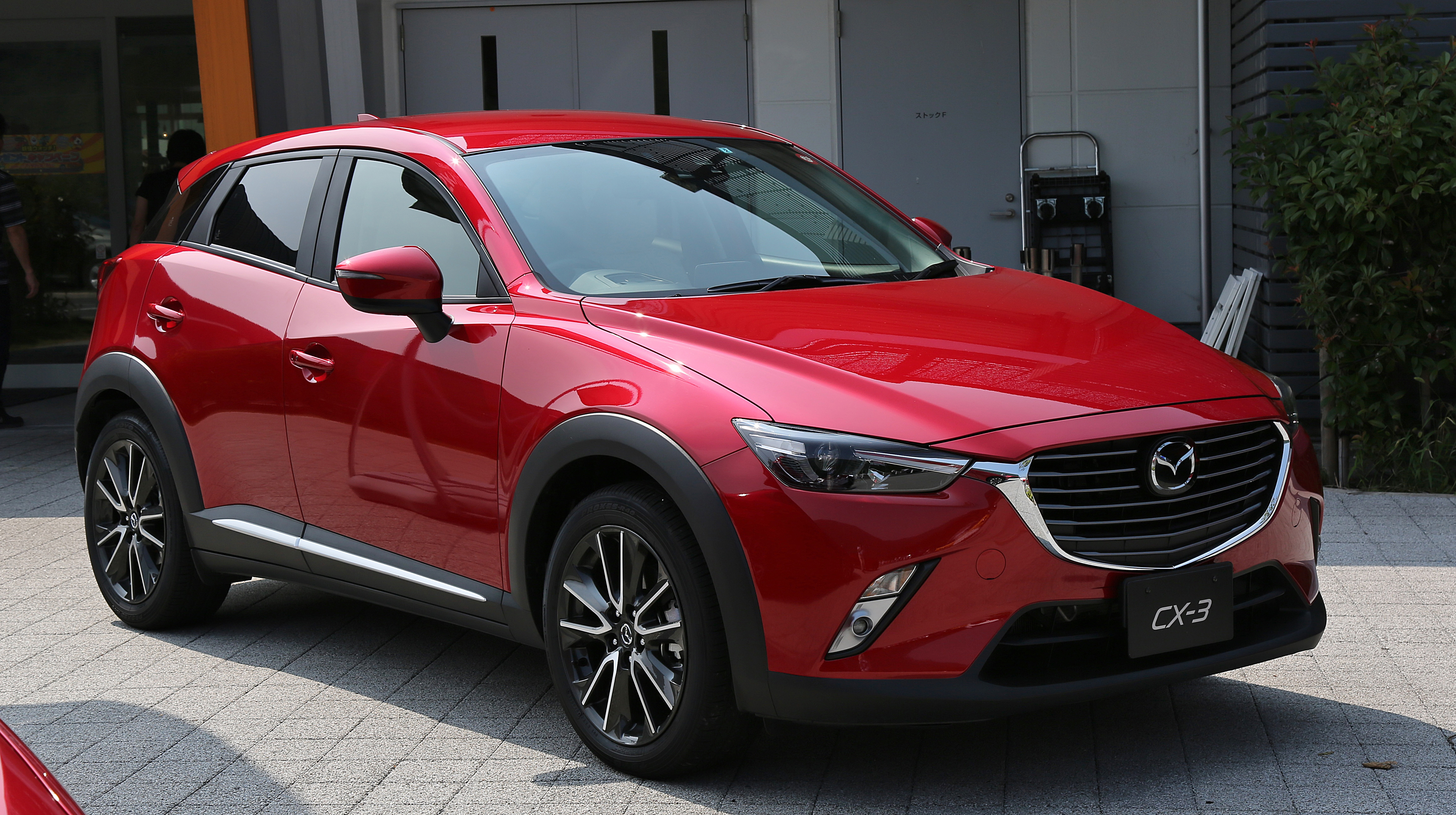 Mazda CX-3